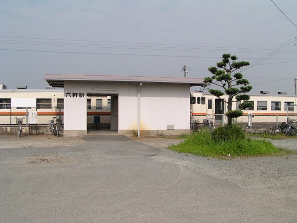 Rokken Station, Matsusaka, Mie, Japan